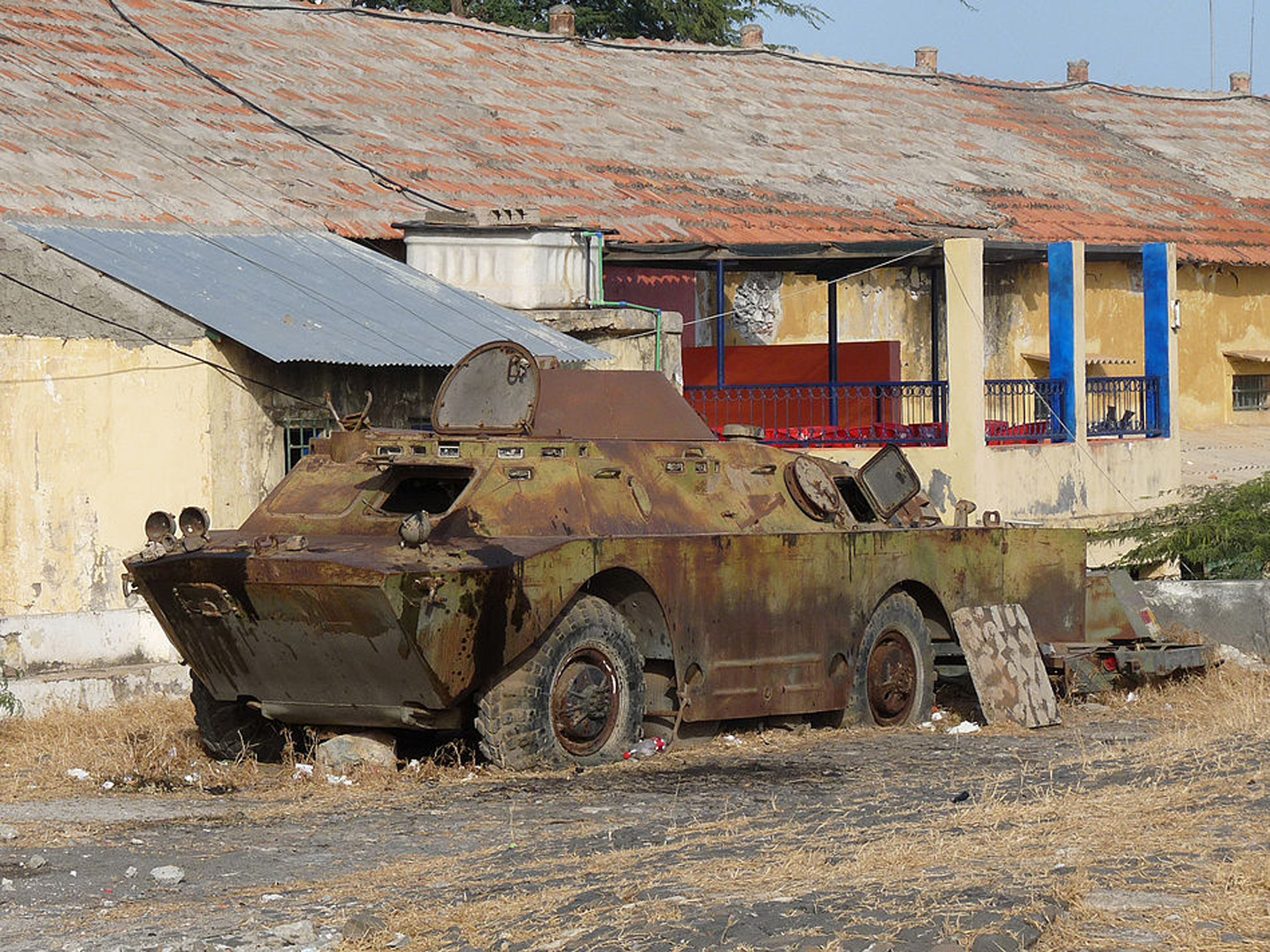 Praia (Cap-Vert) : Quartel Jaime Mota. Ancien véhicule blindé BRDM-2.